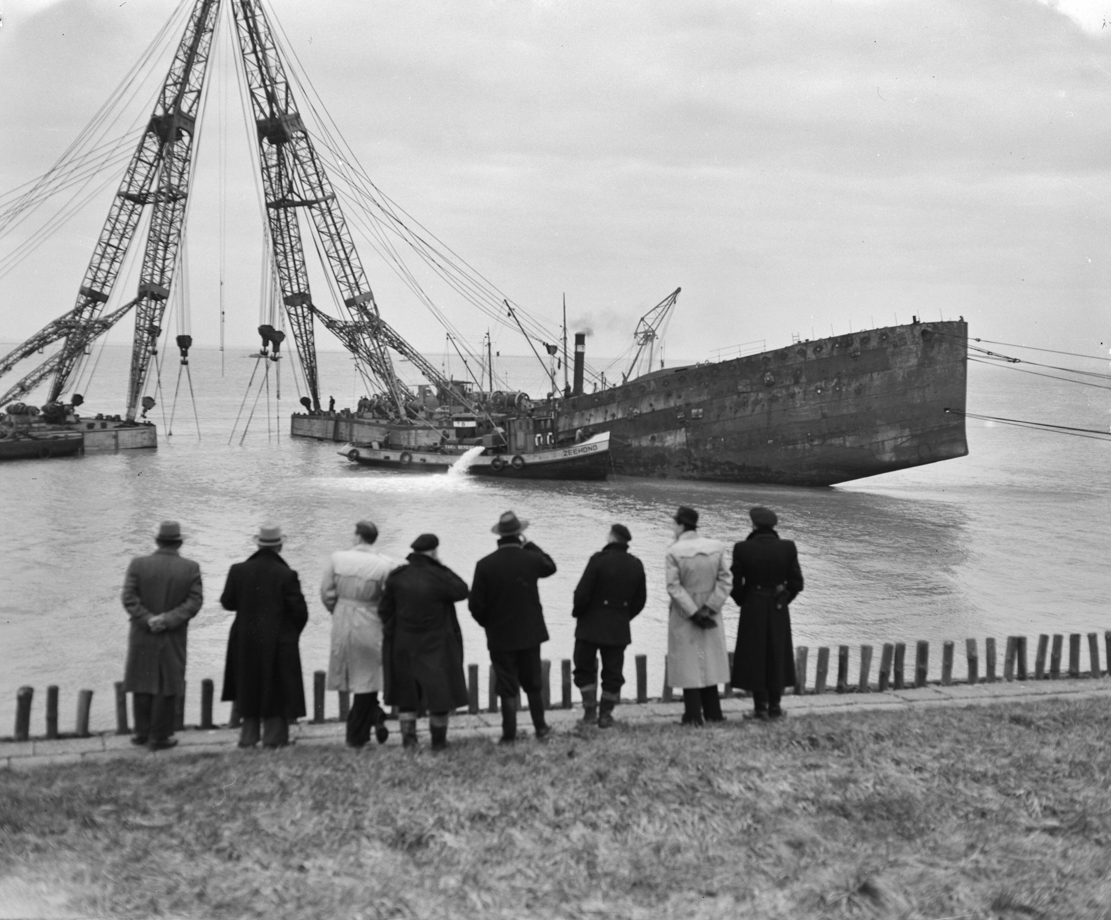 Collectie / Archief : Fotocollectie Anefo Reportage / Serie : [ onbekend ] Beschrijving : Terneuzen lichten Engelse Kruiser "Valentine" Datum : 29 januari 1953 Locatie : Terneuzen, Zeeland Trefwoorden : kruisers, lichten Fotograaf : Duinen, […] van / Anefo Auteursrechthebbende : Nationaal Archief Materiaalsoort : Negatief (zwart/wit) Nummer archiefinventaris : bekijk toegang 2.24.01.04 Bestanddeelnummer : 905-5074